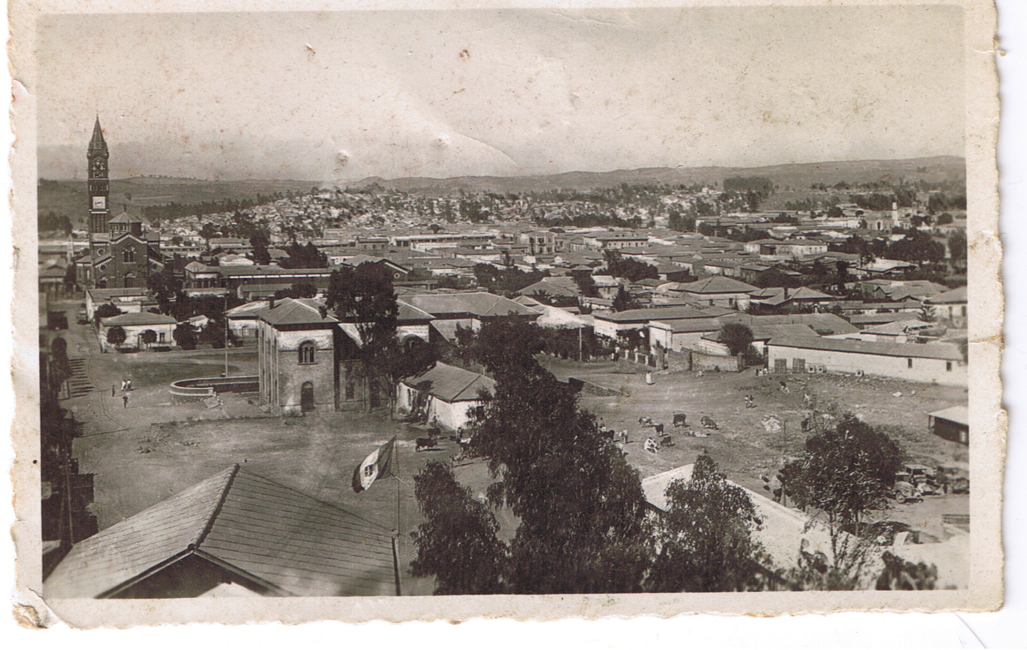 All'epoca del colonialismo Italiano